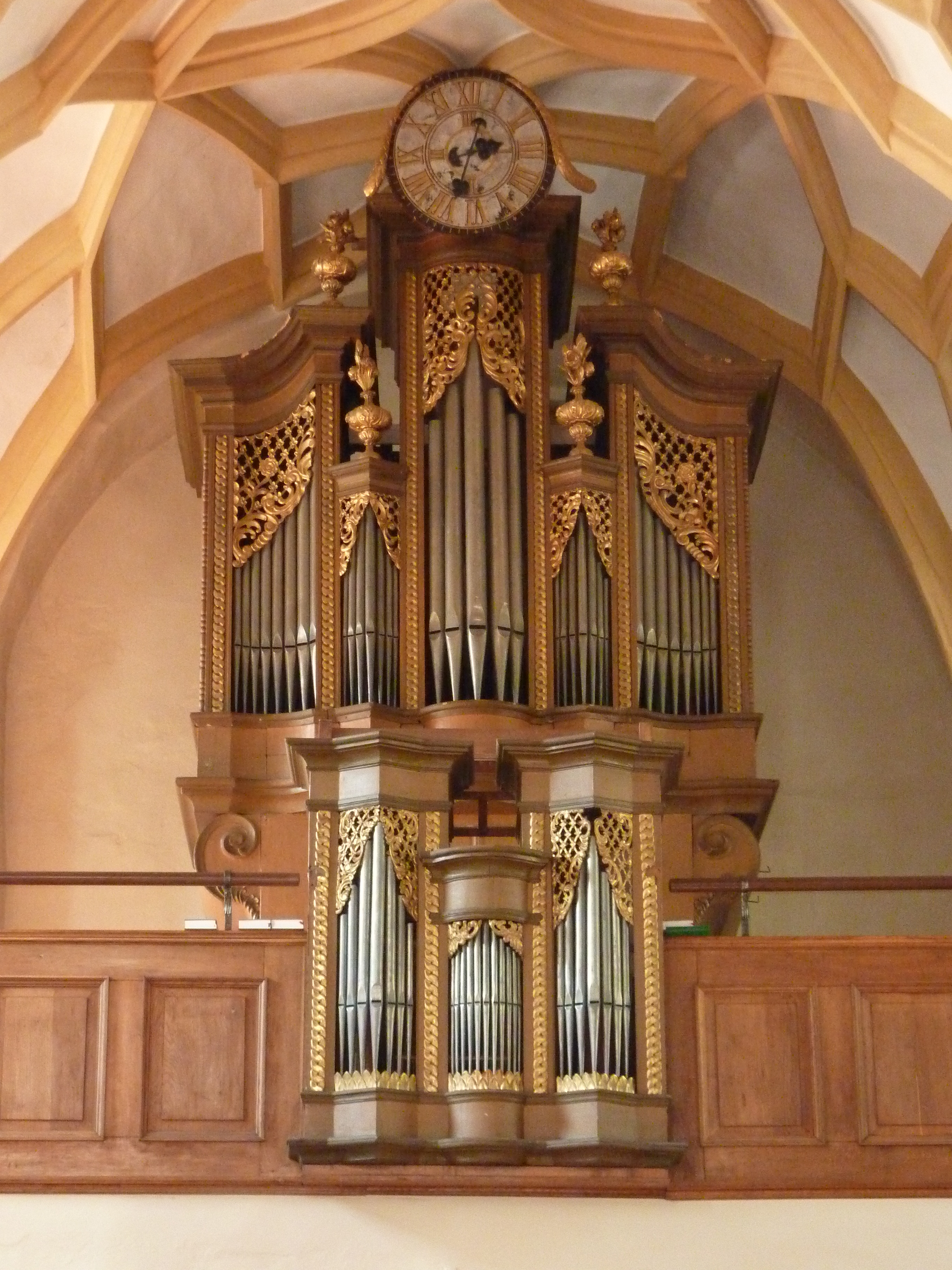 Pfarrkirche hl. Philipp uns Jakob, Gaming, Niederösterreich - „Mozart-Orgel“ (Bartholomäus Heintzler, 1735), (1789 aus dem ehem. Franziskanerkloster Ybbs übertragen)